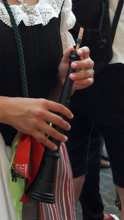 dolçaina valenciana